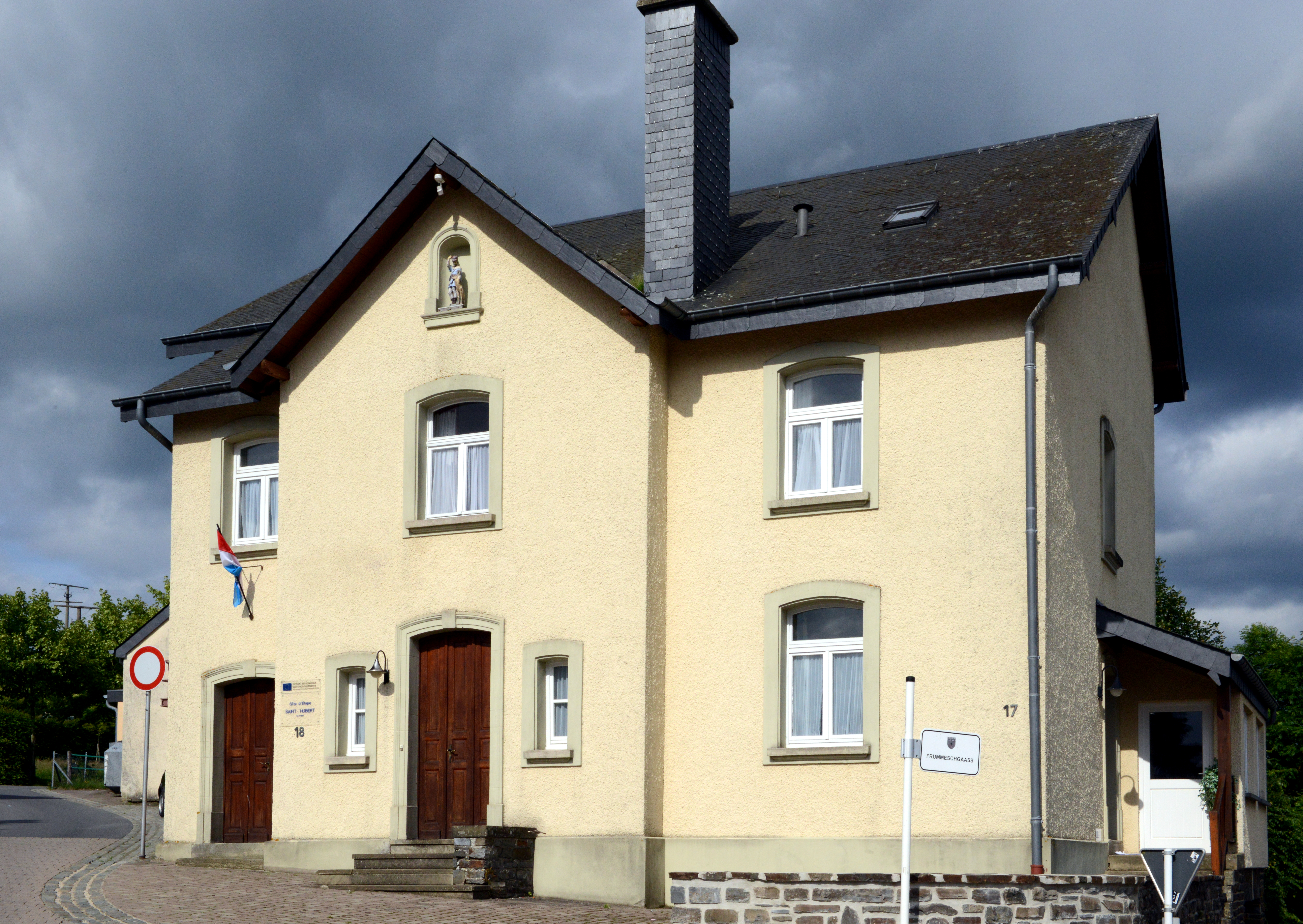 De Gîte St Hubert zu Munzen.